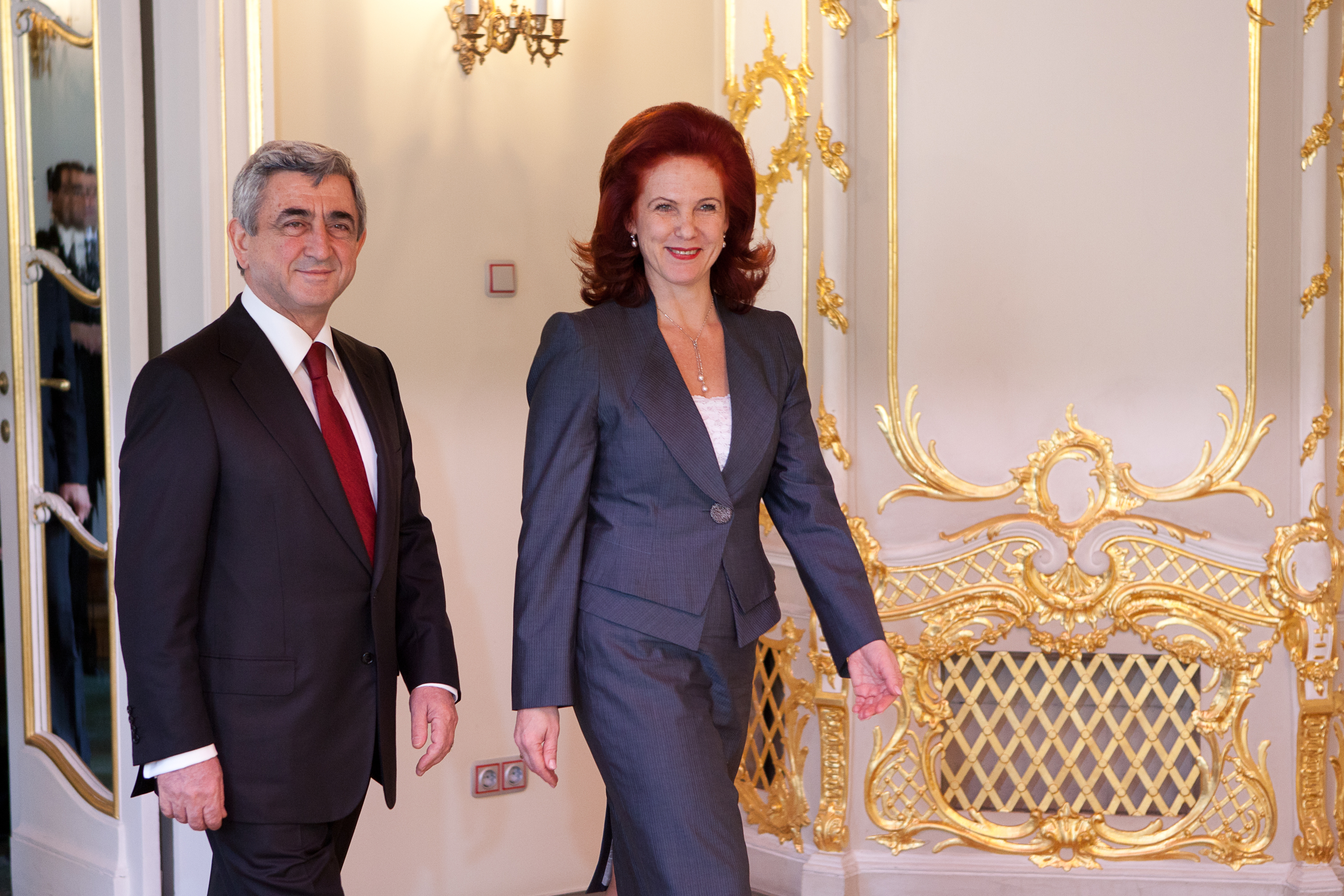 2011.gads 9.marts. Solvita Āboltiņa tiekas ar Armēnijas Republikas prezidentu Seržu Sargsjanu (Serzh Sargsyan) oficiālās vizītes ietvaros. Foto: Saeima